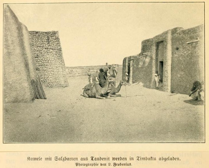 “Salzhändler in Timbuktu mit ihren Kamelen” - from Expeditionsbericht der Zweiten Deutschen Inner-Afrika-Expedition (1907-09) Auf dem wege nach Atlantis., p. 194